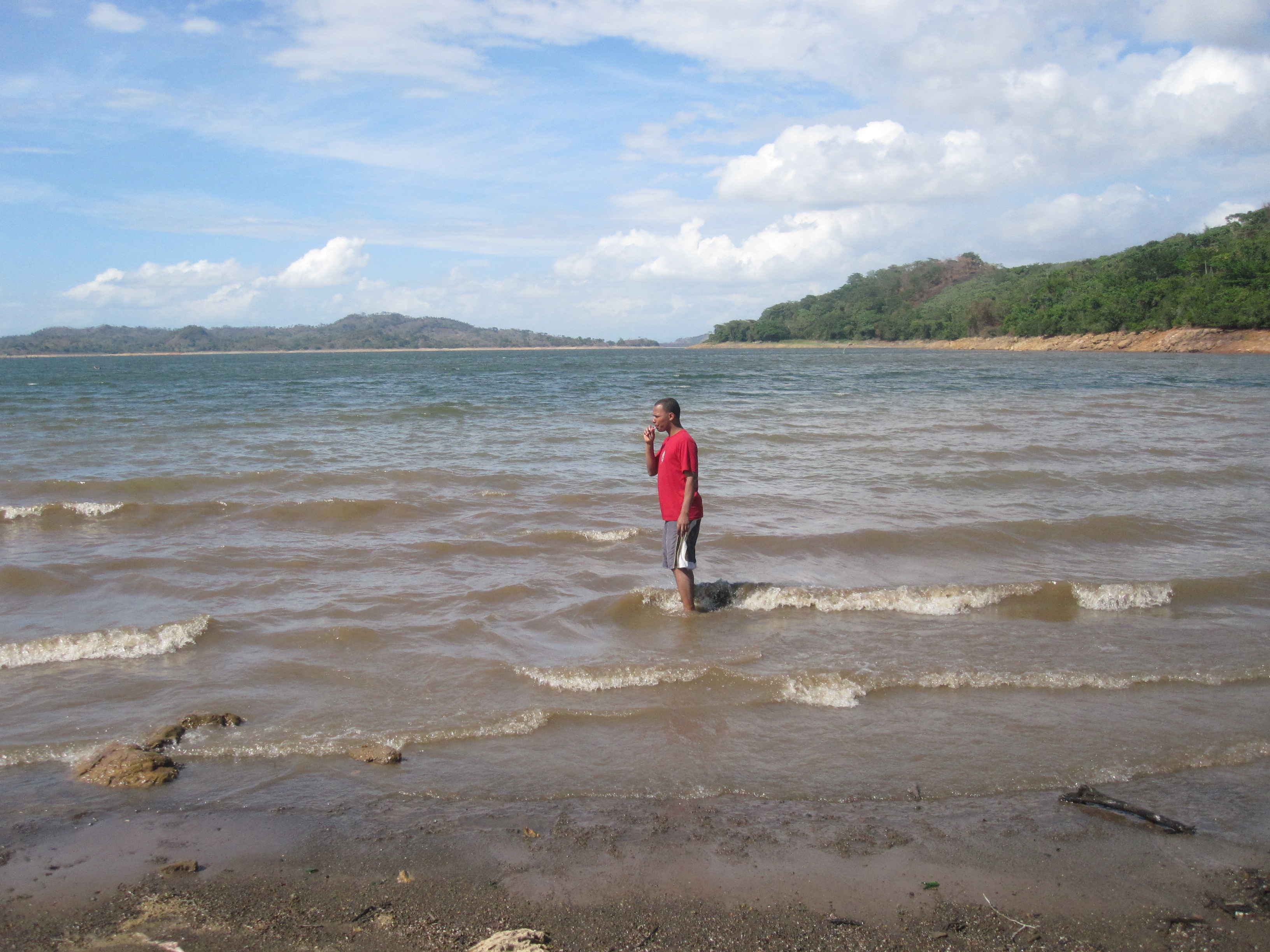 Presa de Hatillo, presa vista desdel el platano, al fondo la sabana del meladito